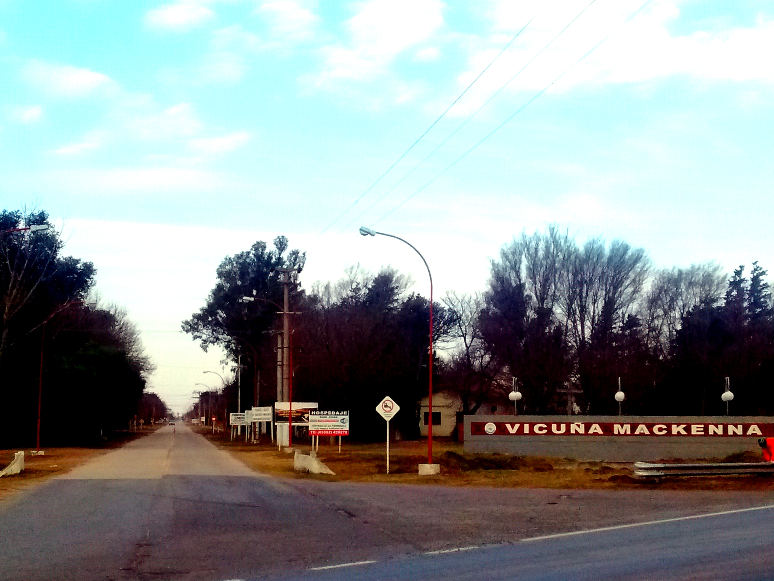 Cartel de bienvenida a la localidad